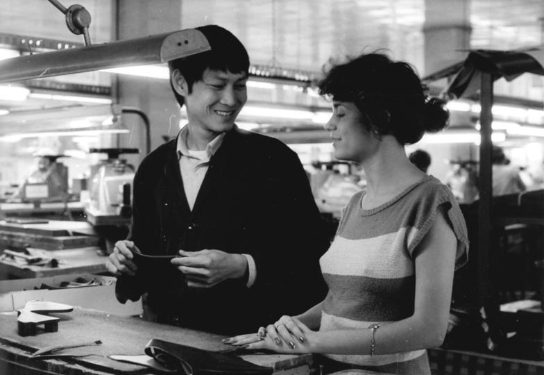 Erfurt, Gastarbeiter im Gespräch ADN-ZB Hirndorf 15.12.89 Erfurt: Vietnamesische Werktätige- 337 vietnamesische Werktätige arbeiten derzeit im VEB Schuhfabrik "Paul Schäfer" Erfurt. Zu ihnen gehört Dinh Quan Khanh, der in der hübschen Kubanerin Carmen Conte Popo nicht nur eine nette Kollegin, sondern auch eine ute Freundin gefunden hat. Während ihres fünfjährigen Aufenthaltes in der DDR sind die vietnamesischen Bürger ihren DDR-Kollegen sowohl arbeitsrechtlich als auch finanziell völlig gleichgestellt. Siehe auch 1989-1215-4N sowie 80 1.